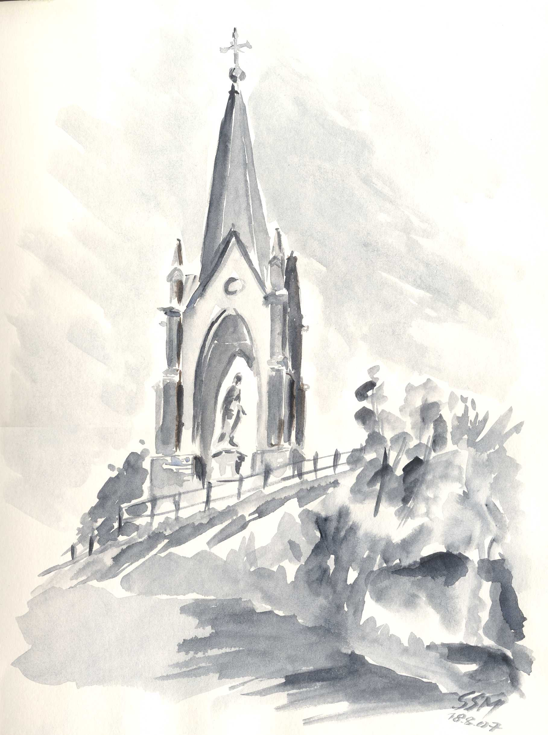 Vesoul, Kapelle de la Motte (378 m), 1857 zum Dank für das Überleben der Stadt bei einer Cholera-Epidemie von 1854 errichtet. Aquarell von Siegfried Schieweck-Mauk, Eichstätt